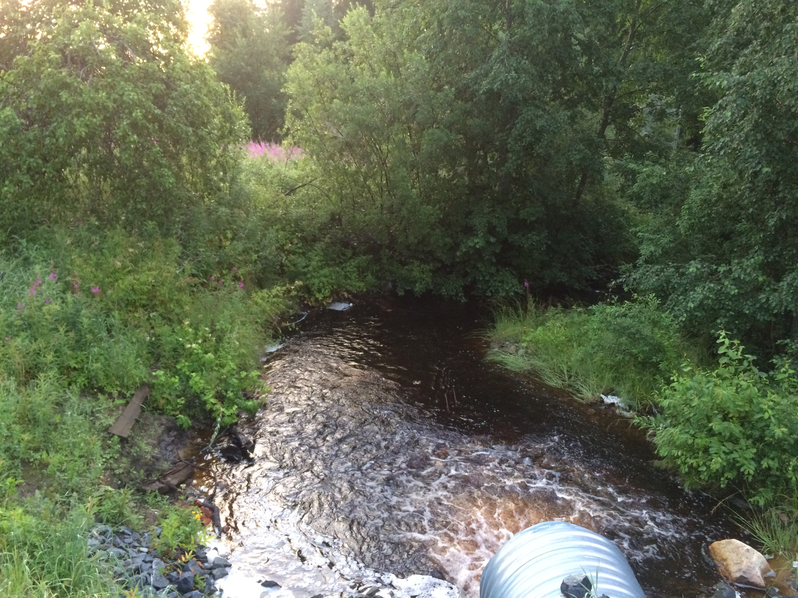 Руокооя (приток Аурайоки)